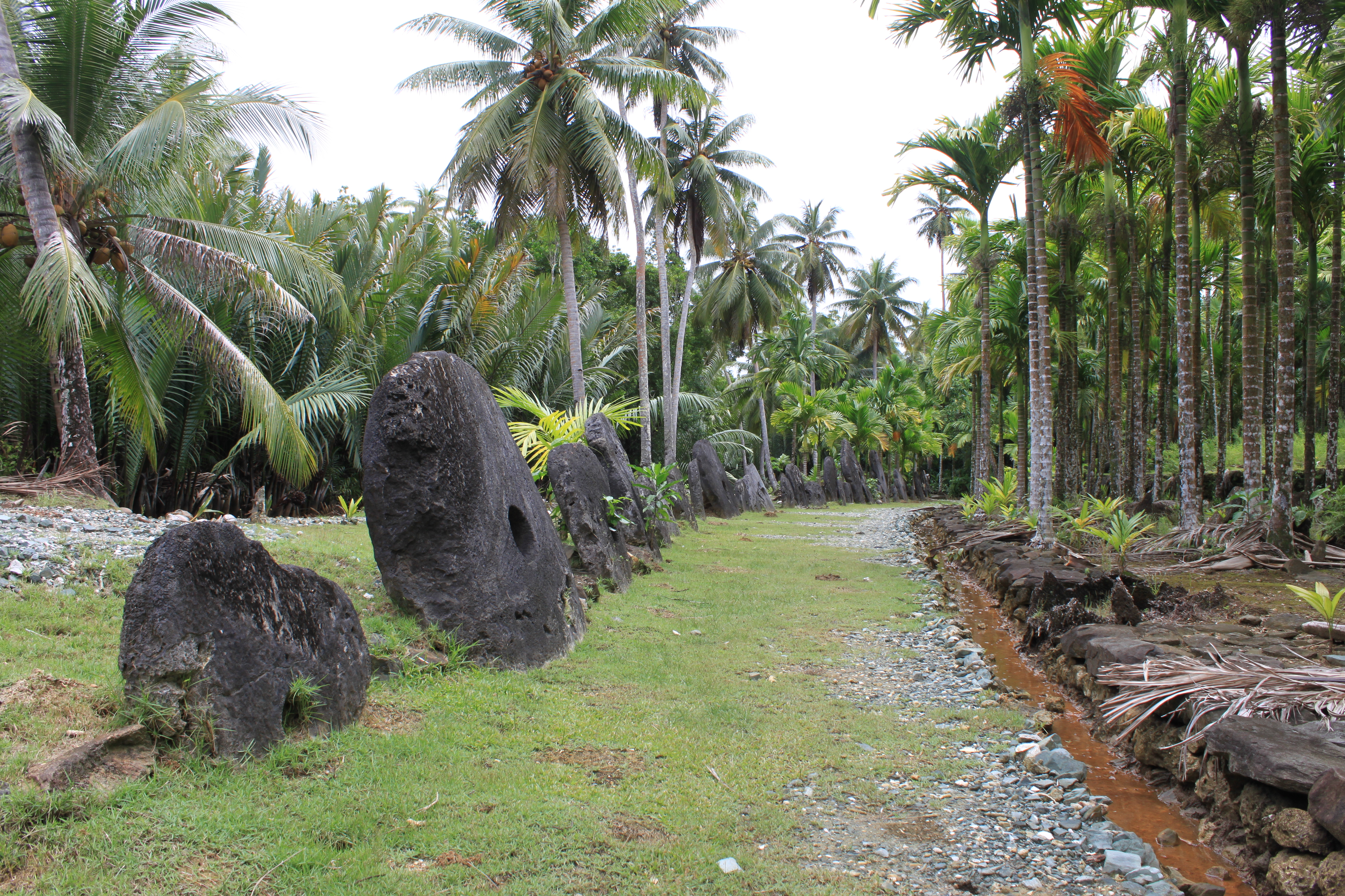 Malal de Yorlap, village de Gal, municipalité de Kanifay, Îles Yap (États fédérés de Micronésie).